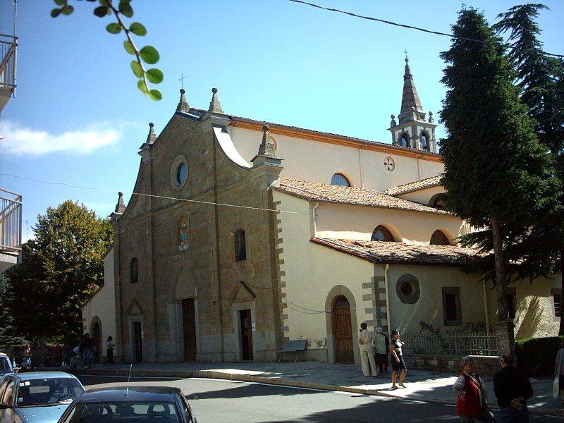 Polinago, provincia di Modena: la chiesa parrocchiale dell'Assunta